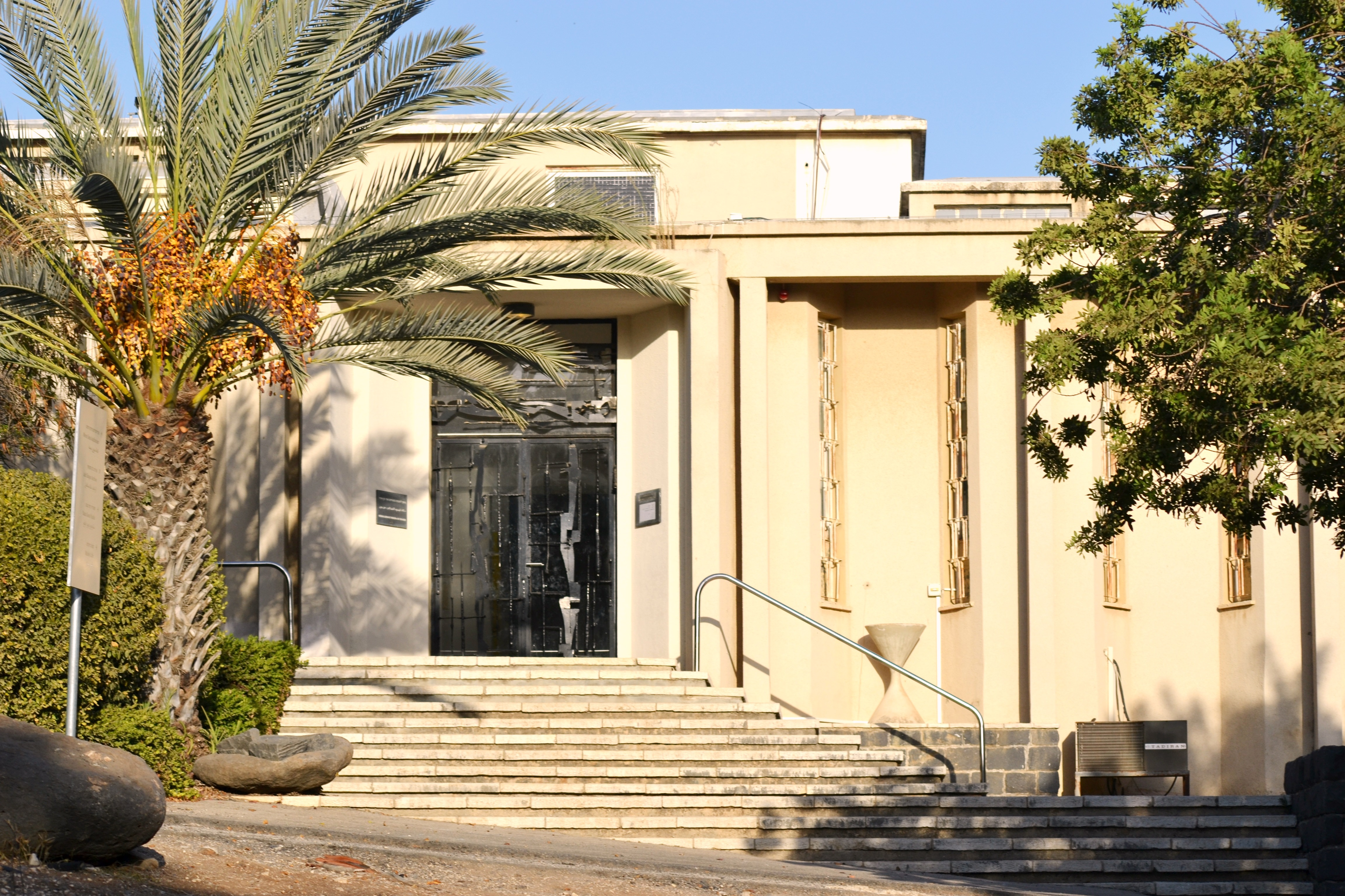 "המשכן לאמנות על שם חיים אתר" או "המשכן לאמנות, עין חרוד" הנו מוזיאון לאמנות ישראלית שהוקם בשנת 1937 בקיבוץ עין חרוד.